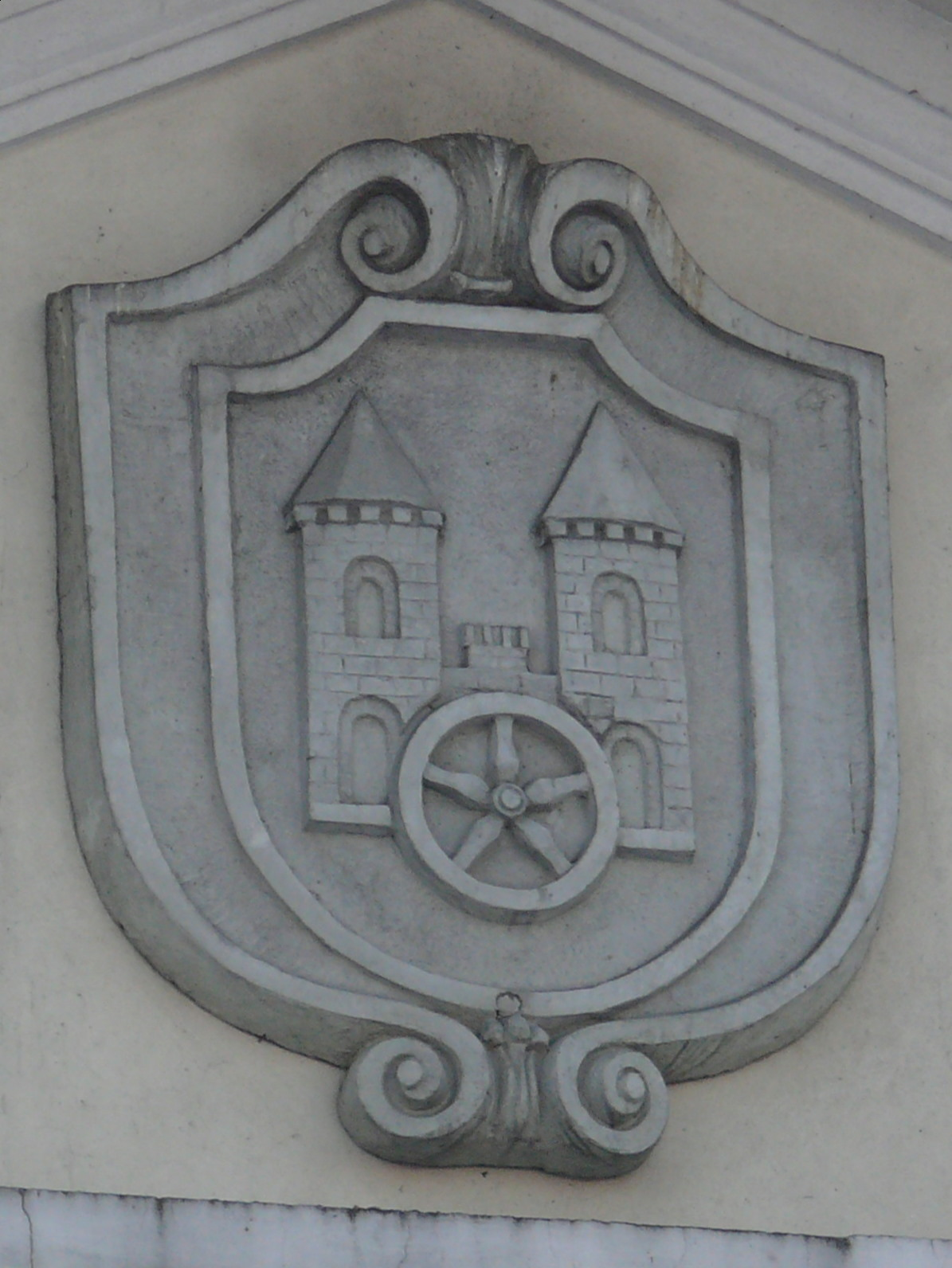 Herb Koła na ratuszu miejskim